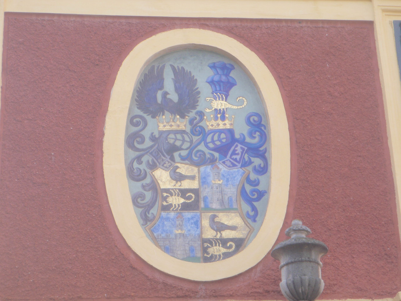 Jurisics Wappen in Günser Rathaus